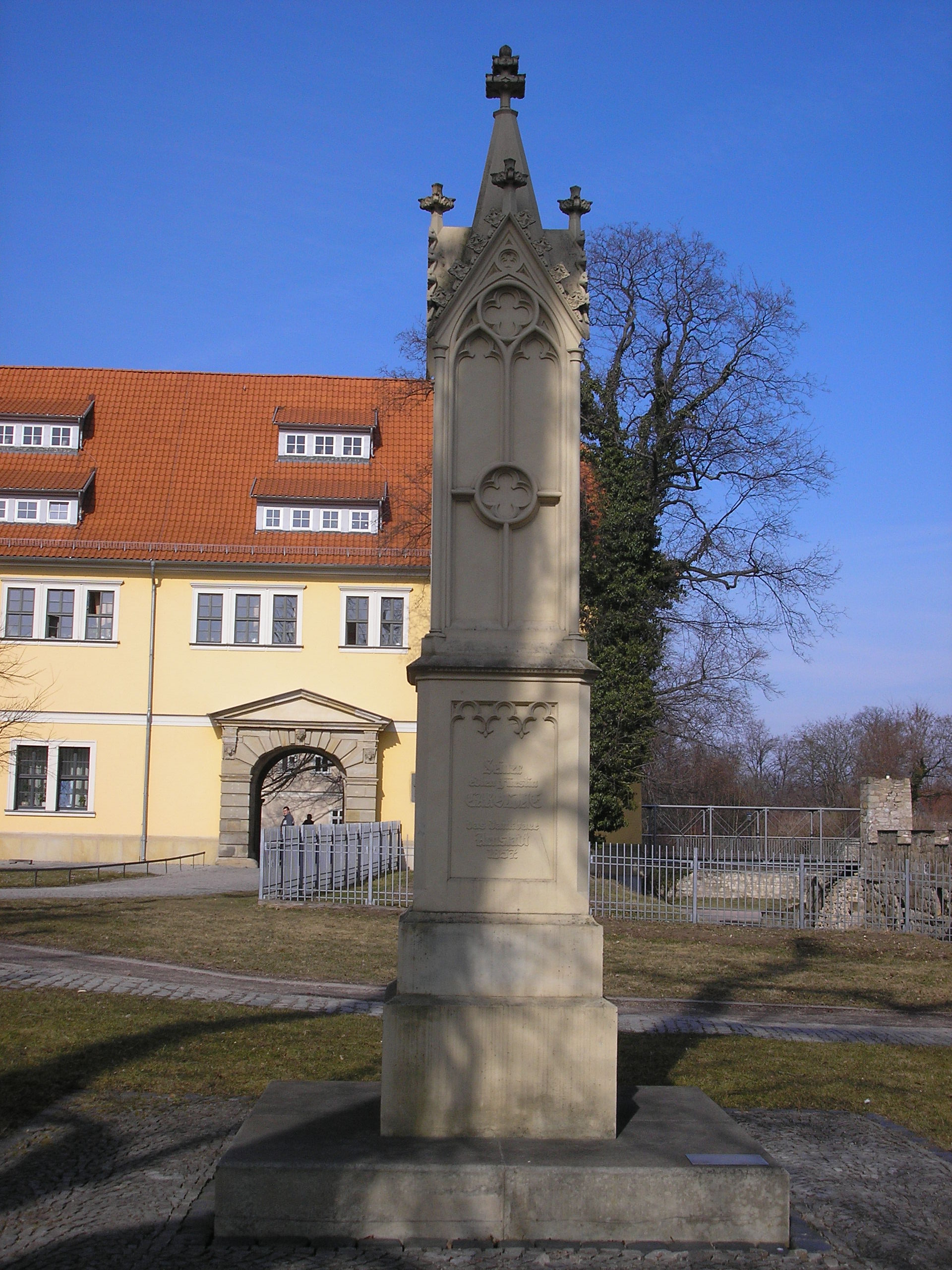 Das Carolinendenkmal am Schloss in Arnstadt (Thüringen).